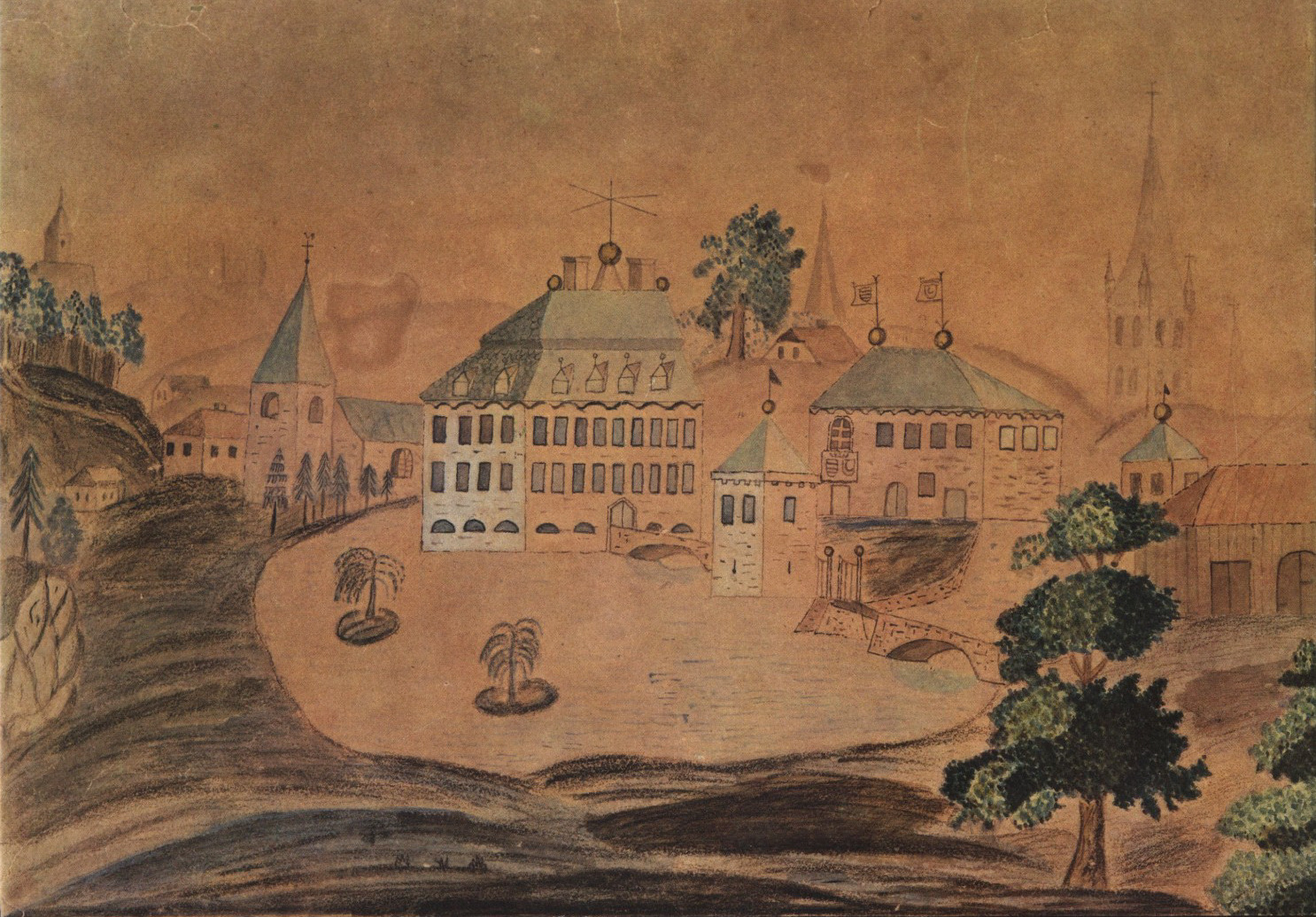 Abbildung des Hauses Weitmar